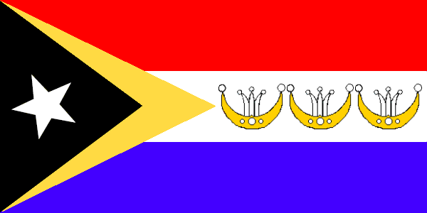 Bandeira do Liquiçá. Fazem parte de Liquiçá os três reinos tradicionais Maubara, Liquiçá e Ulmera (no subdistrito Bazartete). As três coroas Kaibauk sao o seu simbolo. Maubara pertenceu muito tempo aos Países Baixos, o que é recordado pela tricolor holandesa. As cores simbolizam também a história sangrenta, a paz alcançada e o mar no norte assim como ao sul o Lóis, que leva água durante todo o ano, suas fontes de vida.